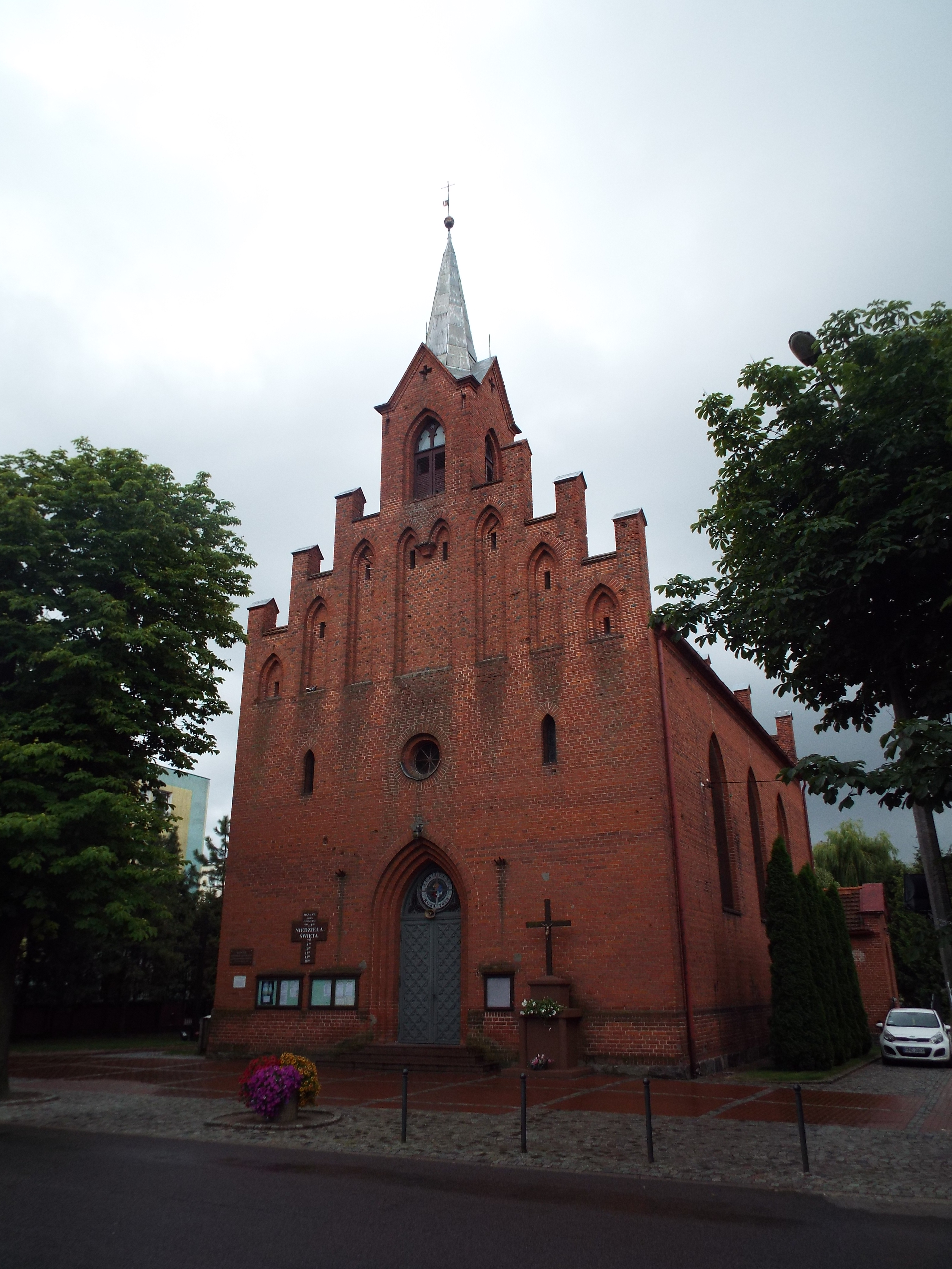 Nowy Dwór Gdański, ul. Drzymały 3 - rzymskokatolicki kościół parafialny p.w. Przemienienia Pańskiego, 1848-1850.